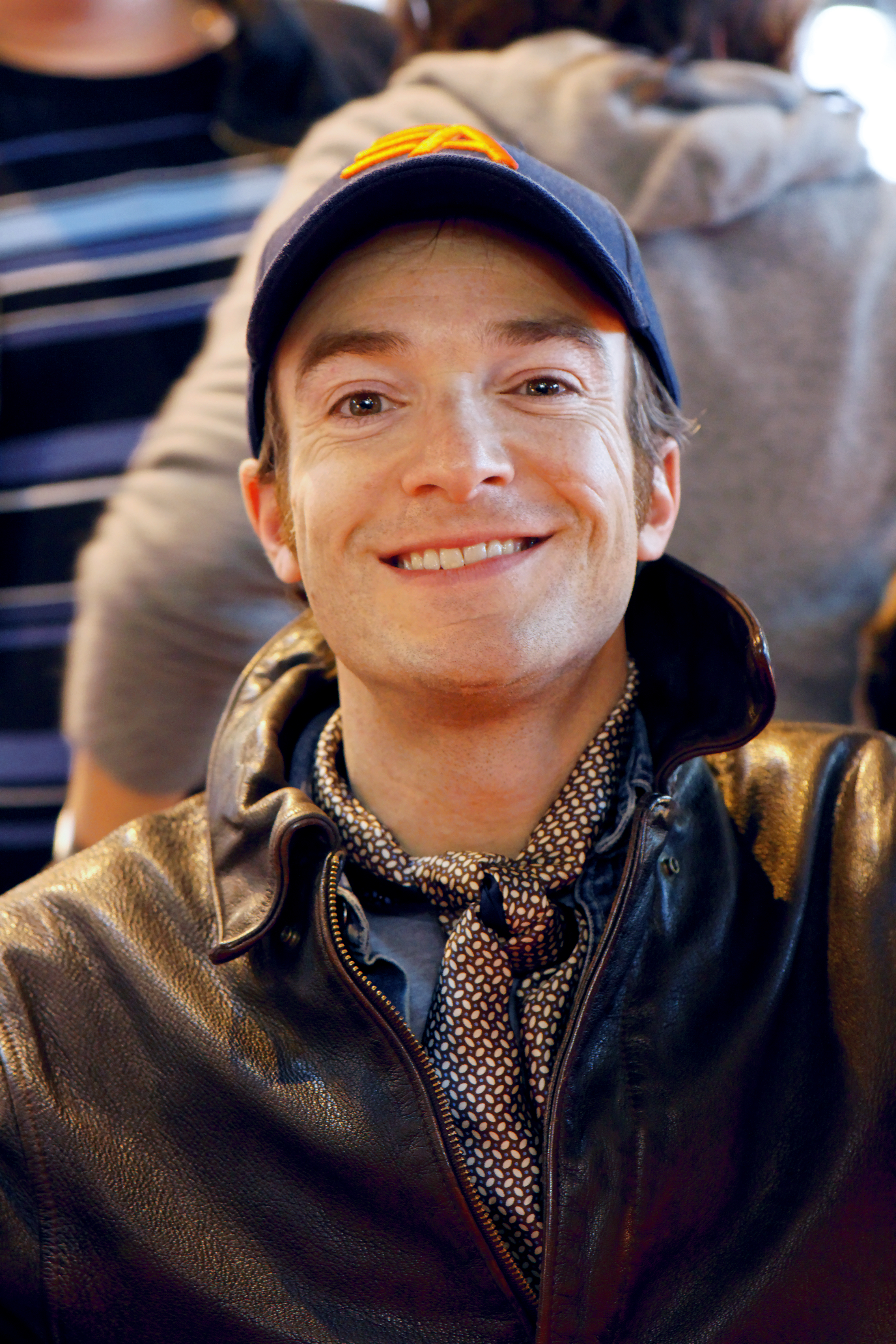 Jonathan Lambert lors du salon du livre de Paris 2011.